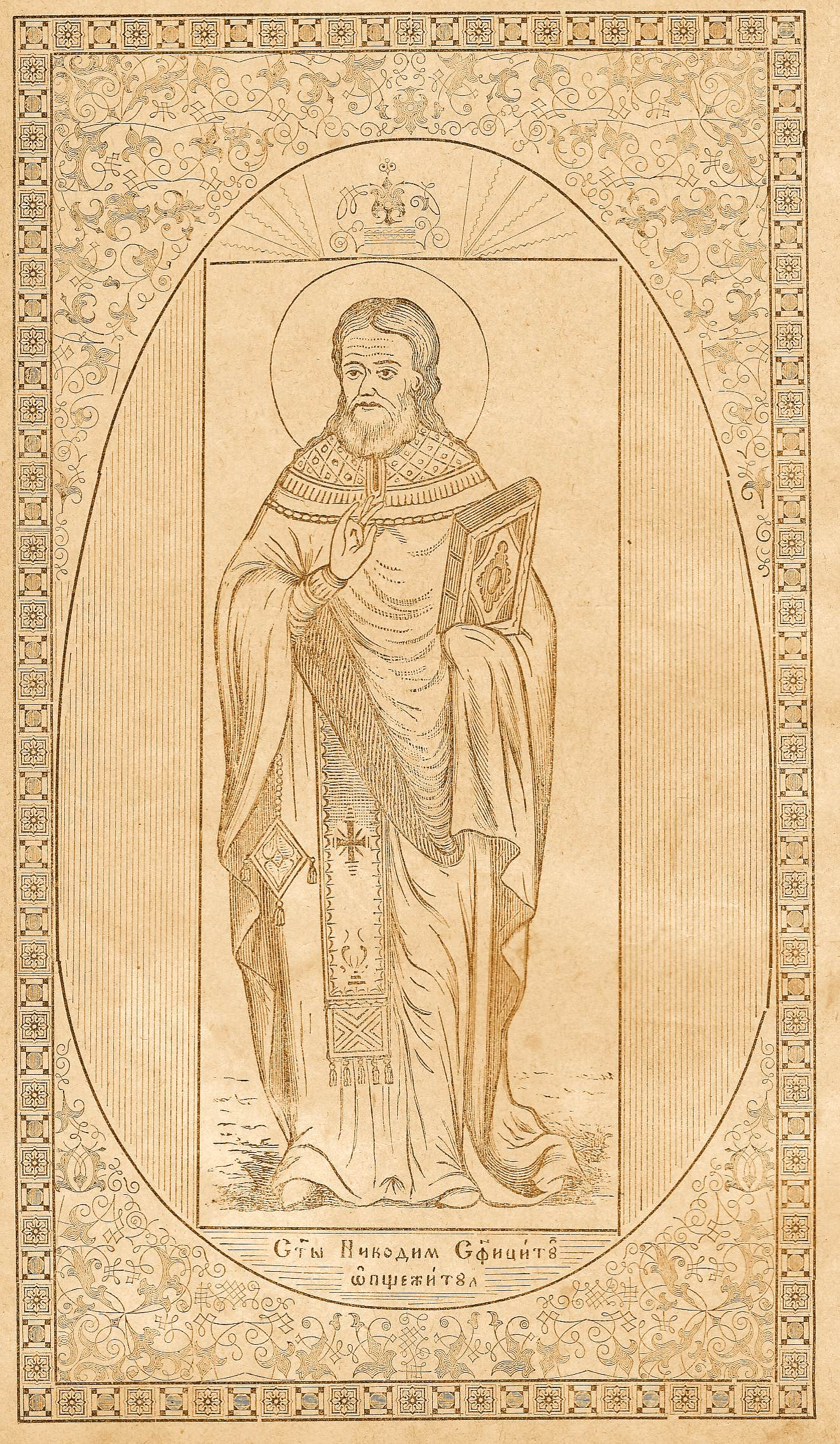 Sfântul Nicodim cel Sfinţit de la Tismana (1310-1406)